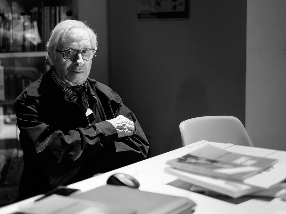 Il maestro Renzo Tortelli